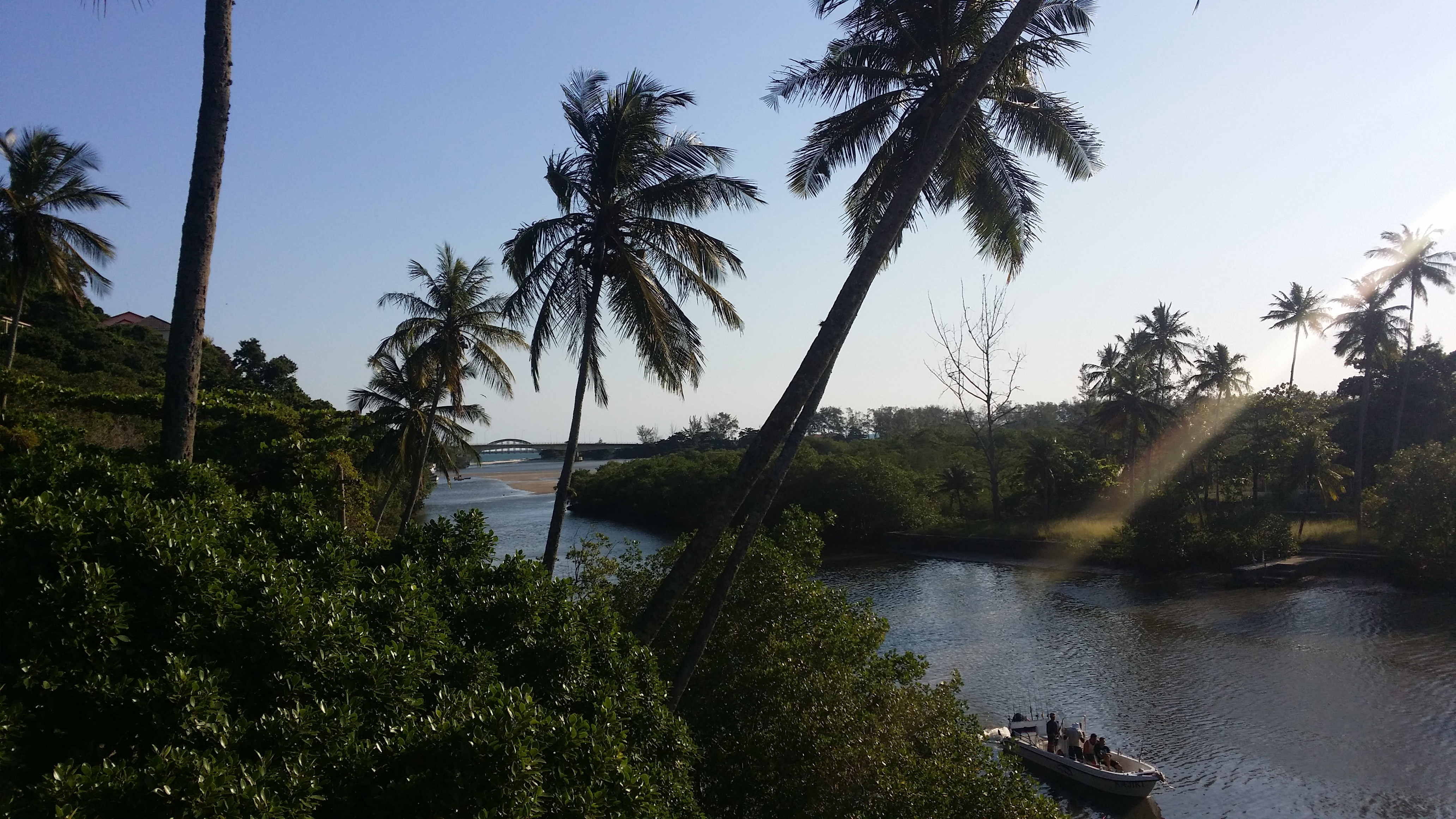 Região de mangue no bairro Barra de Guaratiba, na cidade do Rio de Janeiro